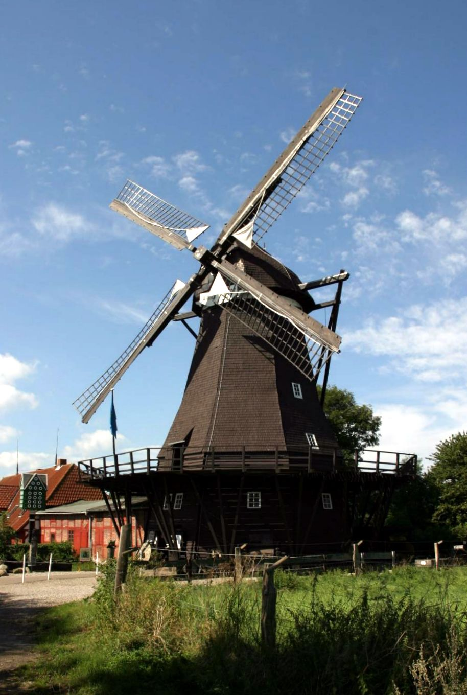 Windmill in Lemkenhafen, Isle of Fehmarn, Germany